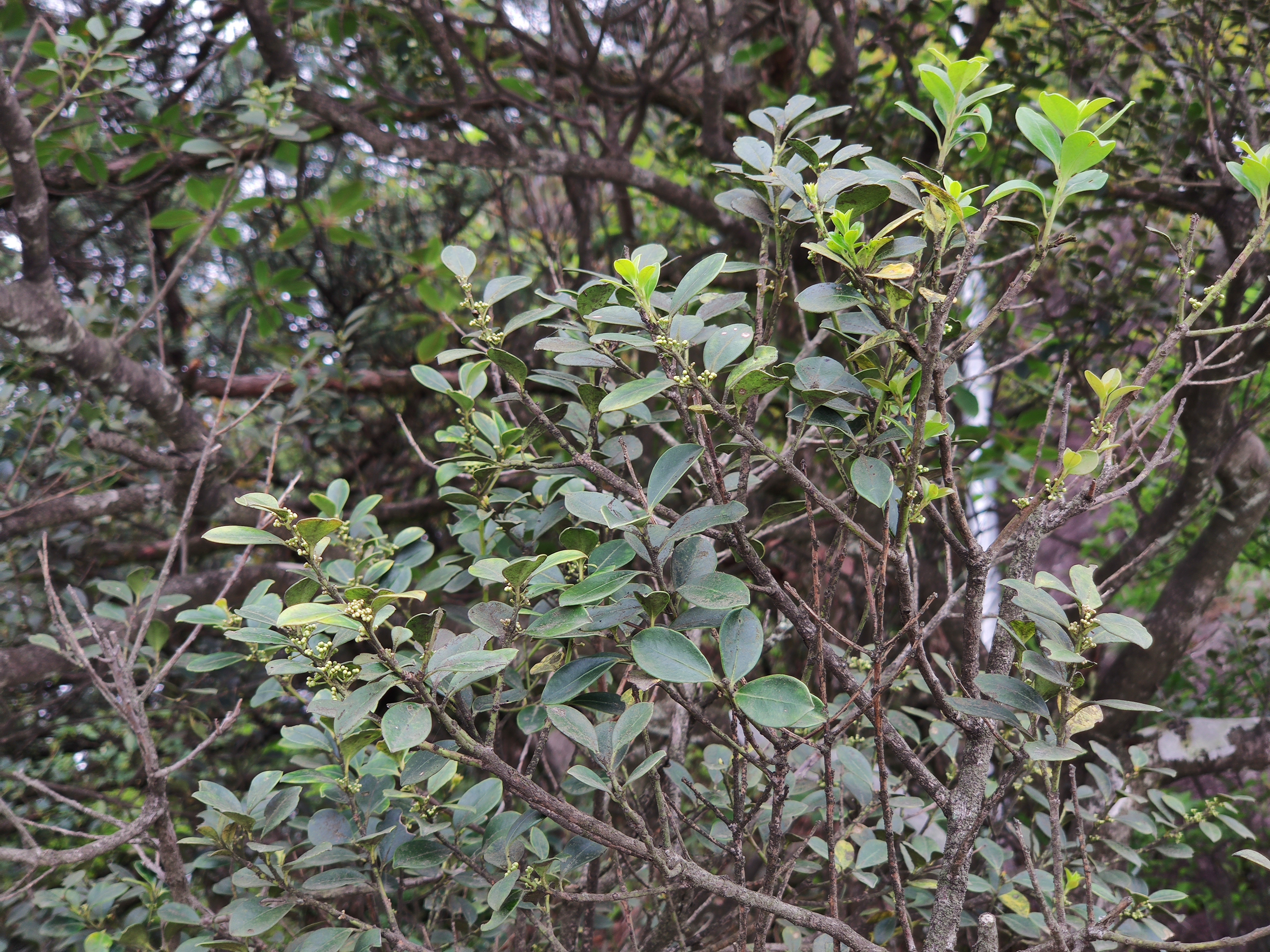 凹叶冬青，摄于江西宜春明月山